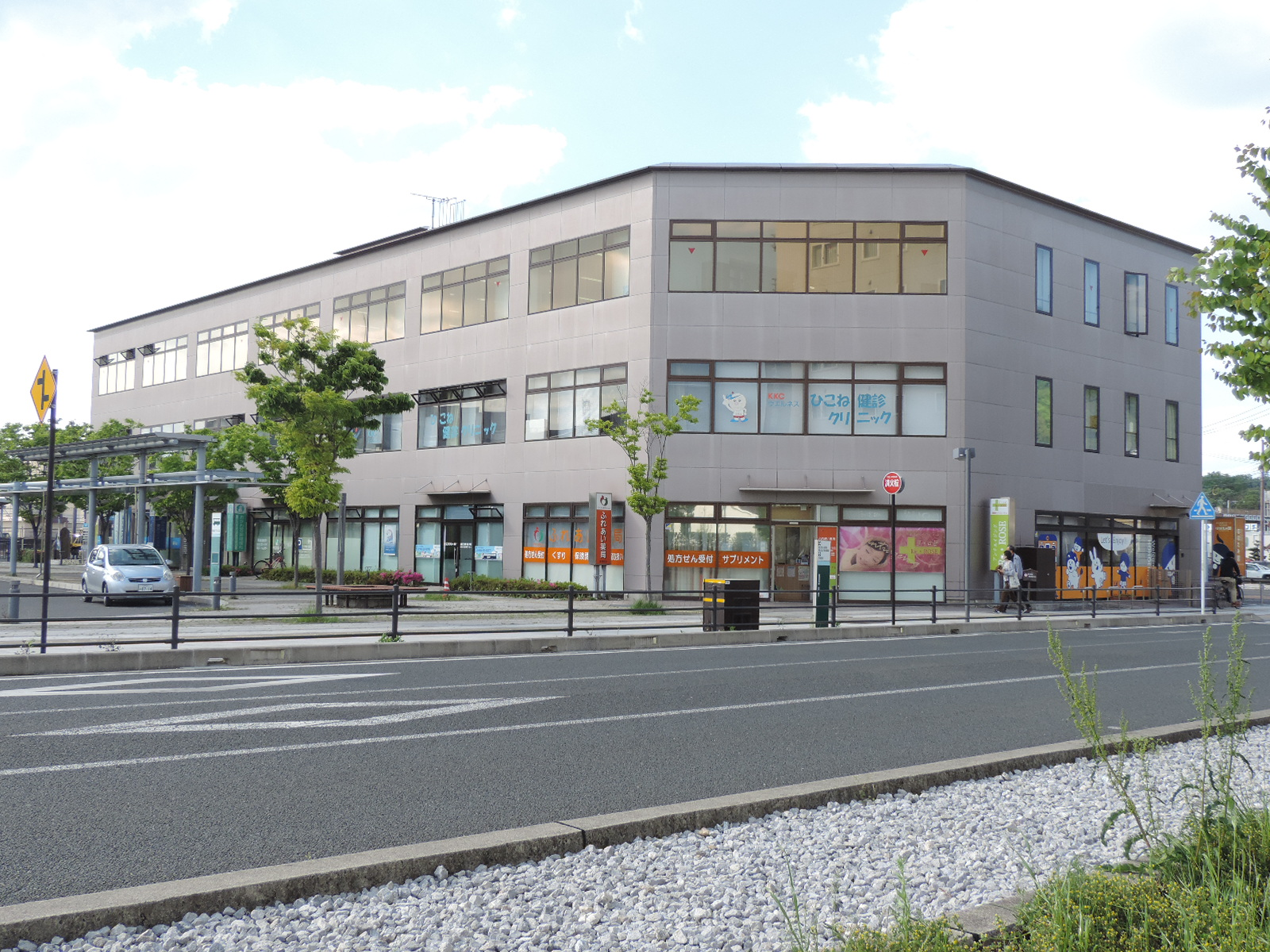 近江鉄道ビル（滋賀県彦根市：2017年撮影）